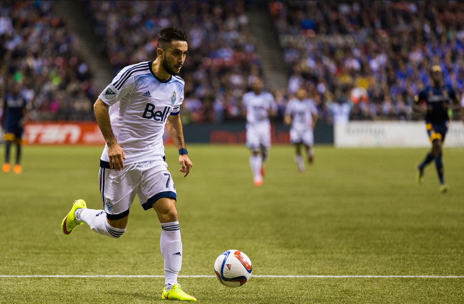 Pedro Morales